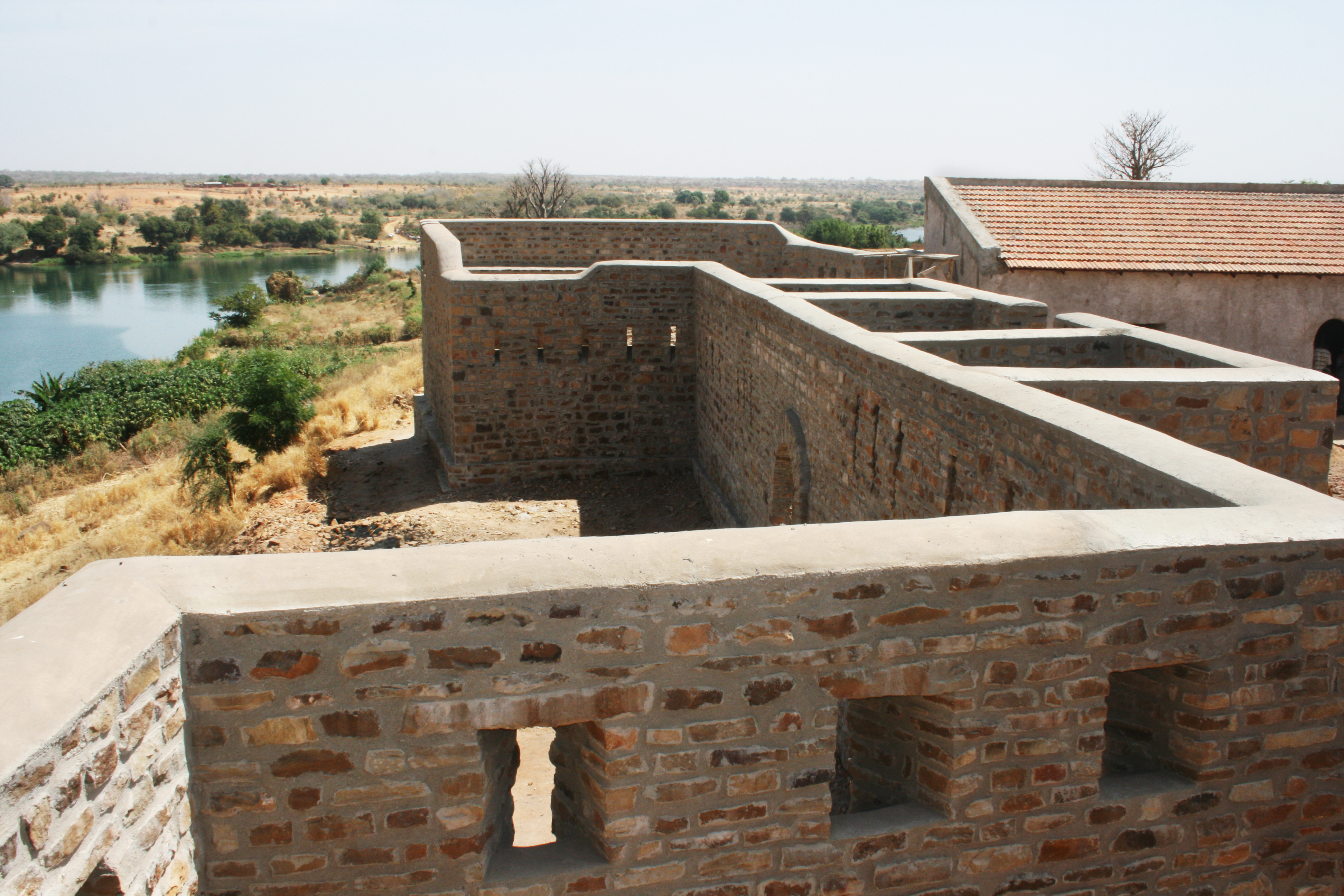 Fort de Médines, Région de Kayes au Mali